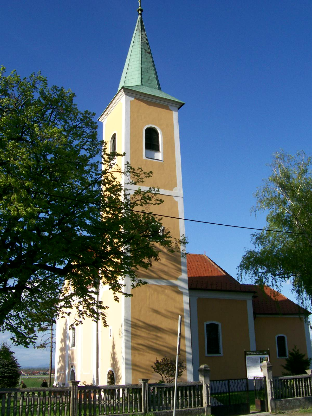 Crkva Presvetog Trojstva u Svetoj Nedelji, Zagrebačka županija.